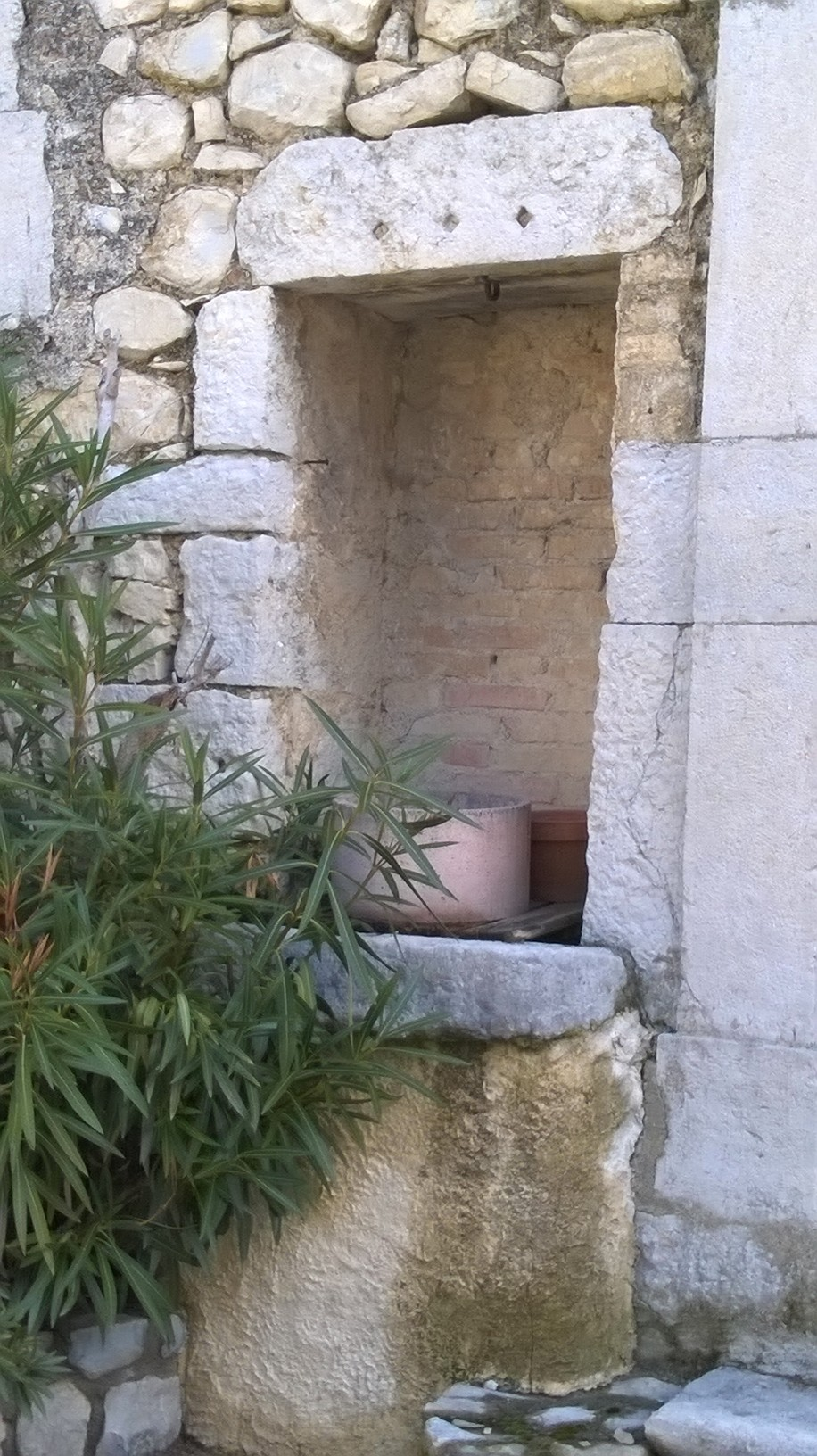 Puits de St Andéol-de-Berg en Ardèche